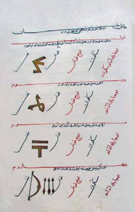 Yazıcıoğlu Ali'nin Tevârih-i Âl-i Selçuk eserinden bir sayfa.